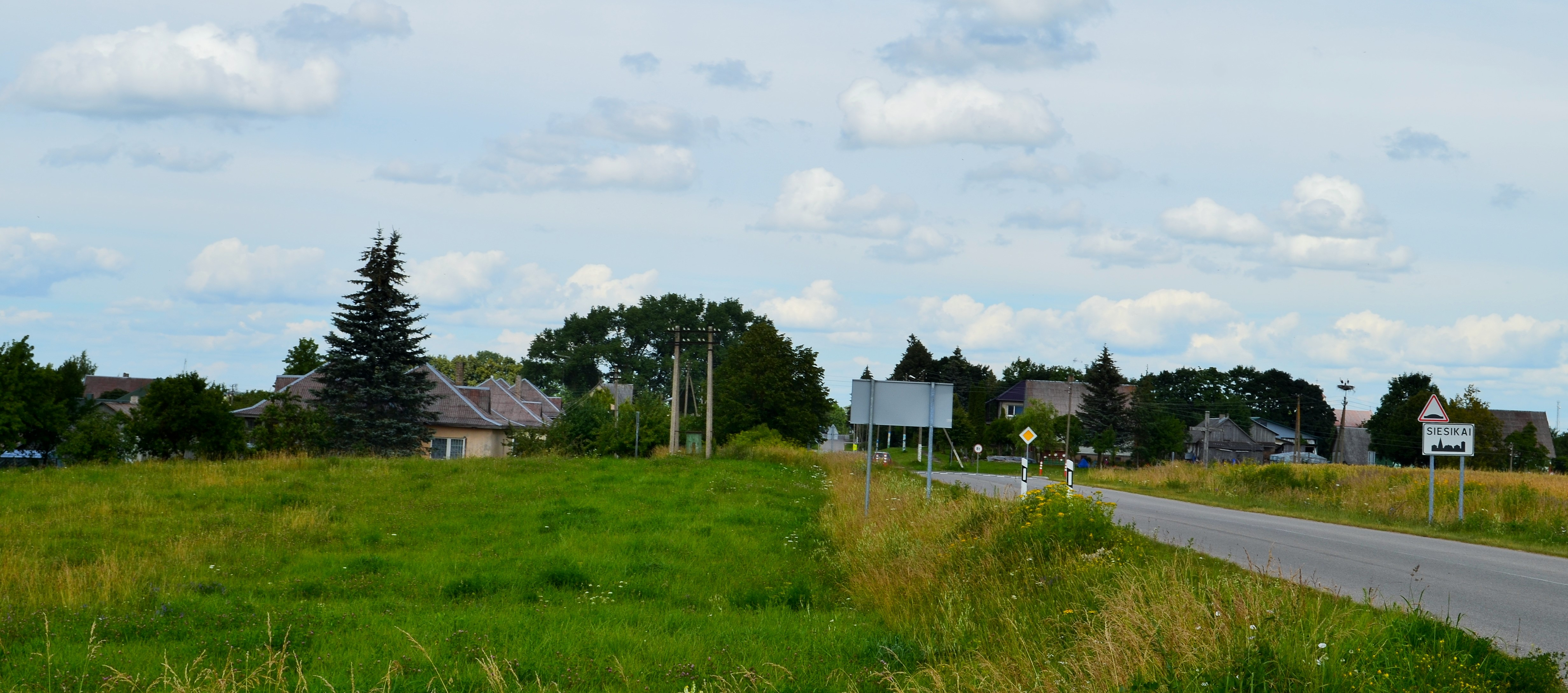 Siesikai iš pietų pusės, Ukmergės raj.